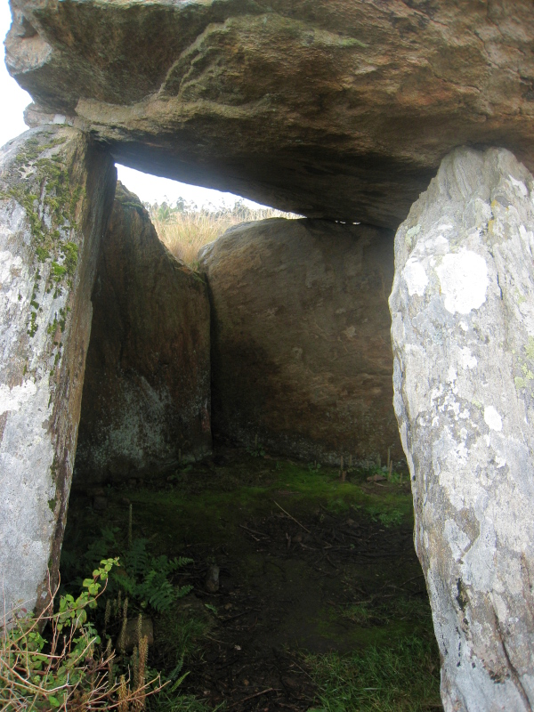 Monumento megalítico da Arca da Piosa - Câmara (desde o noroeste)